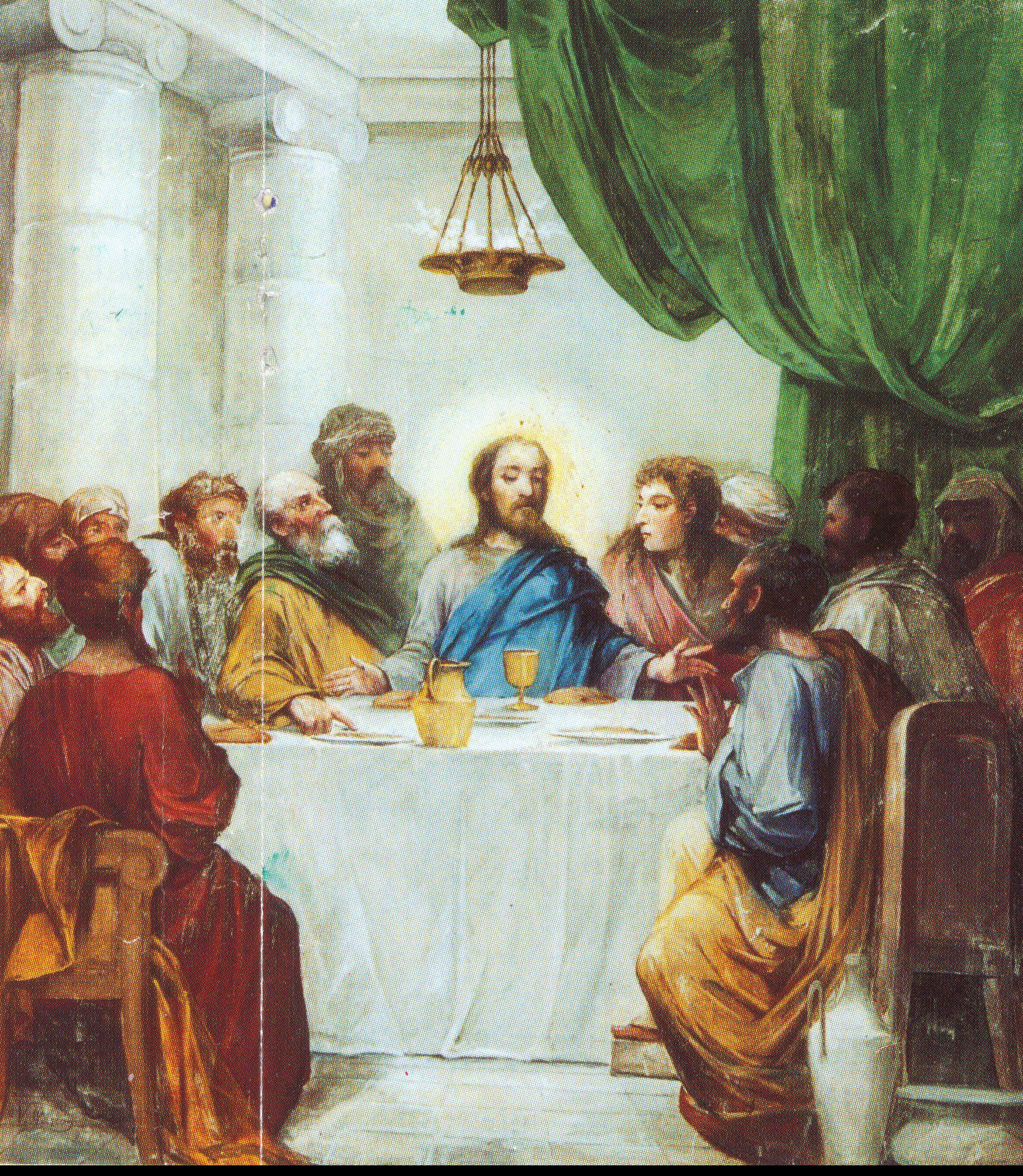 Decoracion iglesia de Macastre